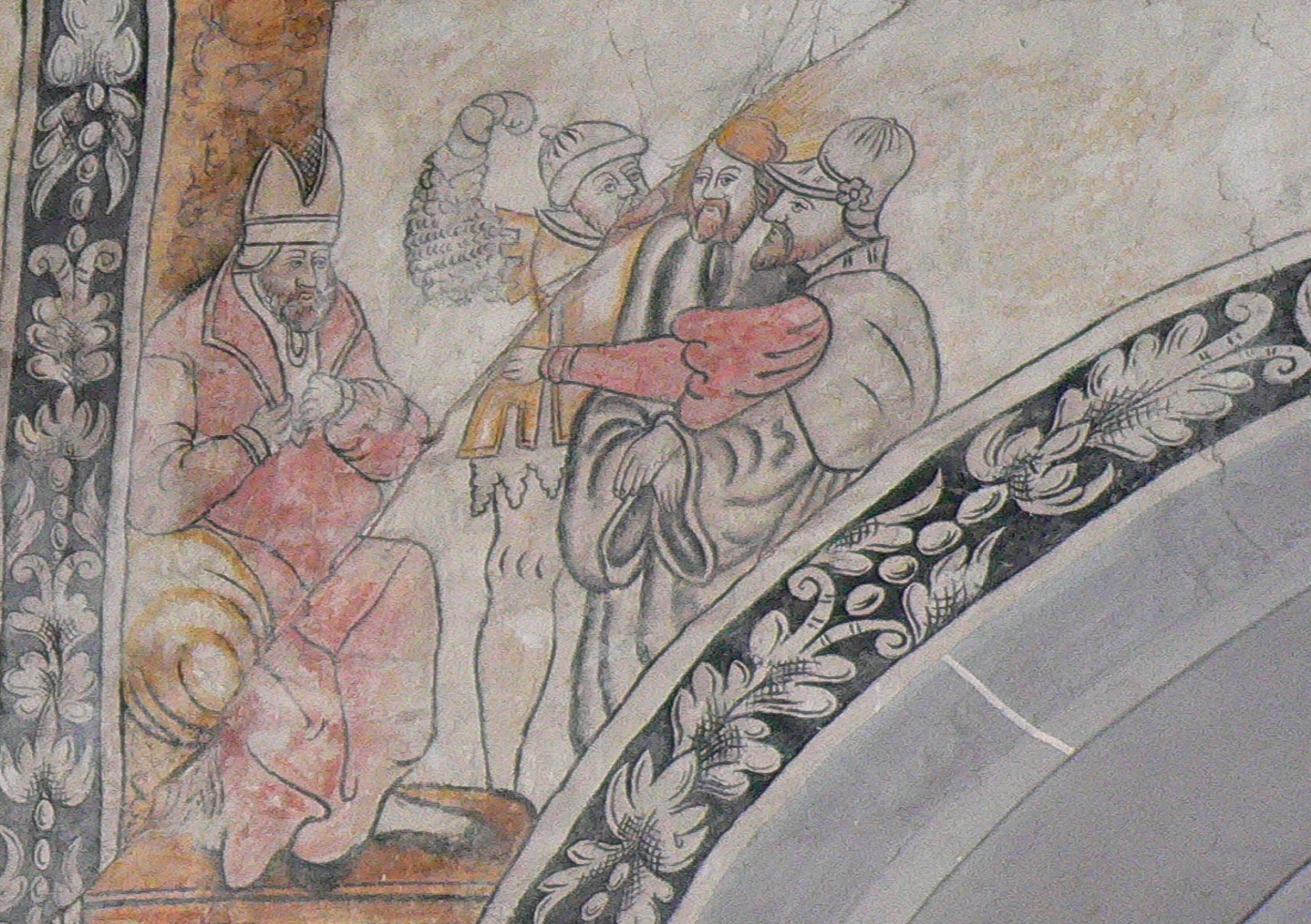 Evangelische Kirche St. Laurentius in Dassel, Niedersachsen, Deutschland - Protestantische Renaissancemalerei (Secco): "Das Verhör" von 1577